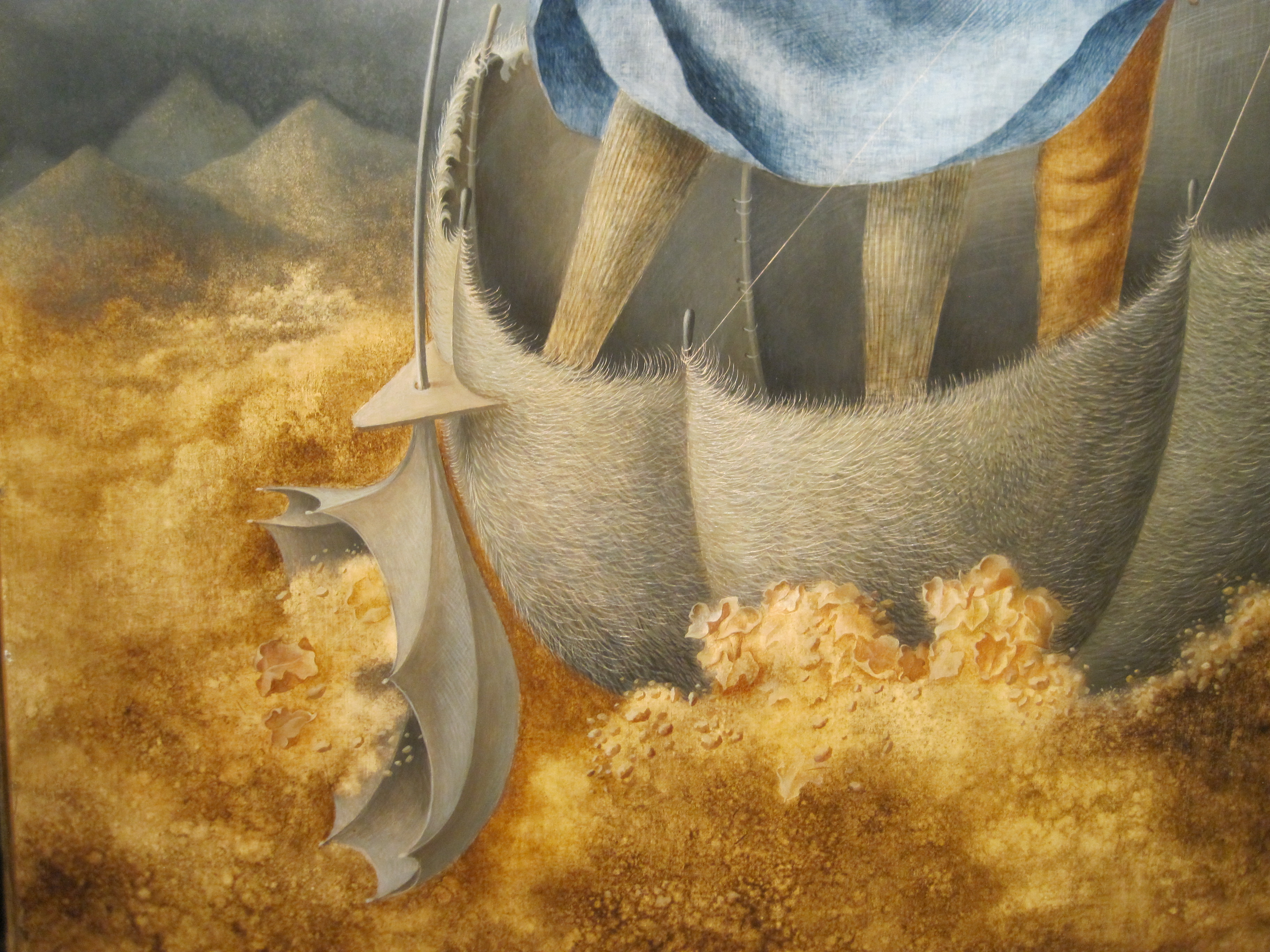 Museo de Arte Moderno